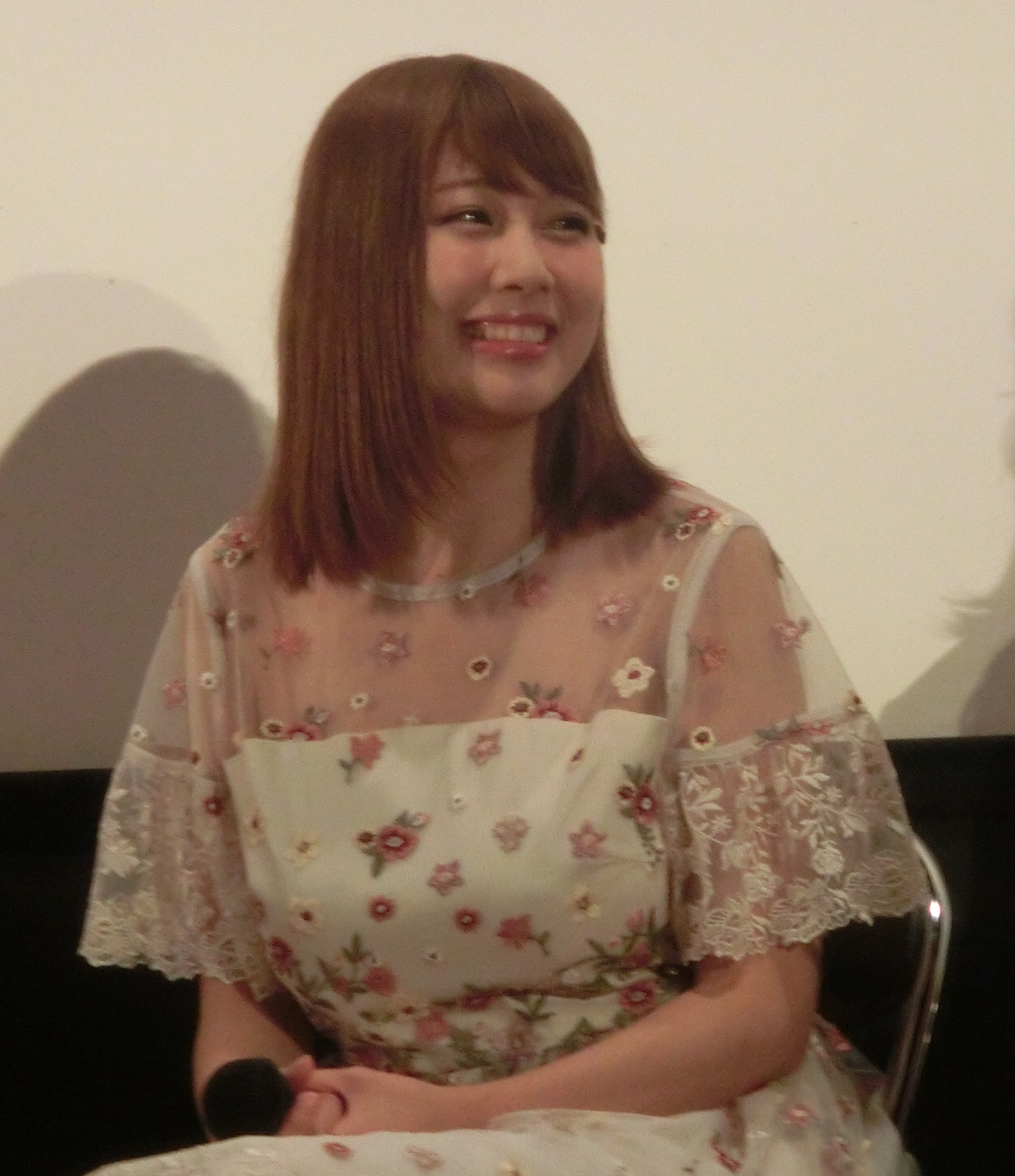 上野オークラ劇場2019年8月10日舞台挨拶